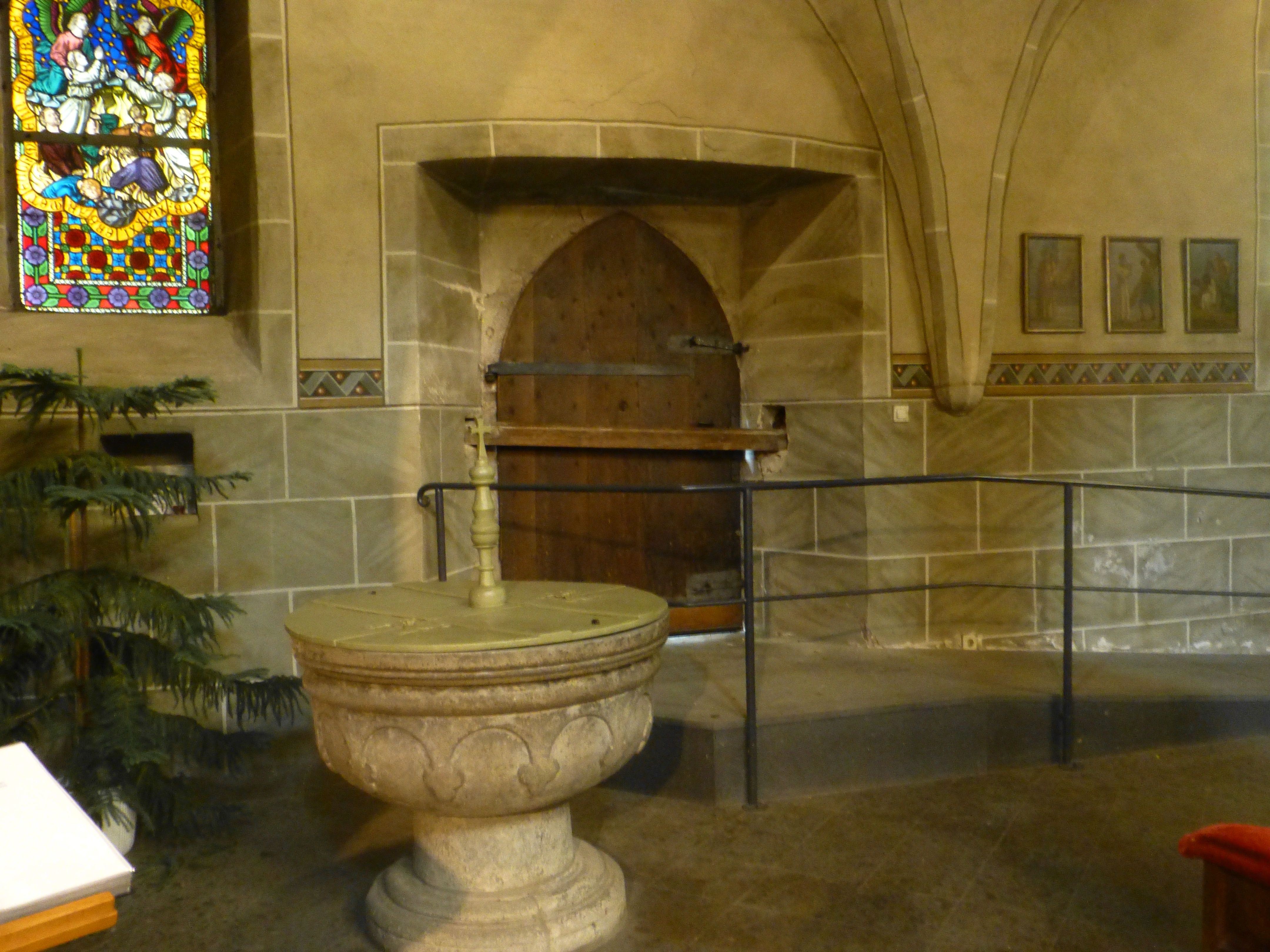 St. Johannes in Lahr: Taufbecken